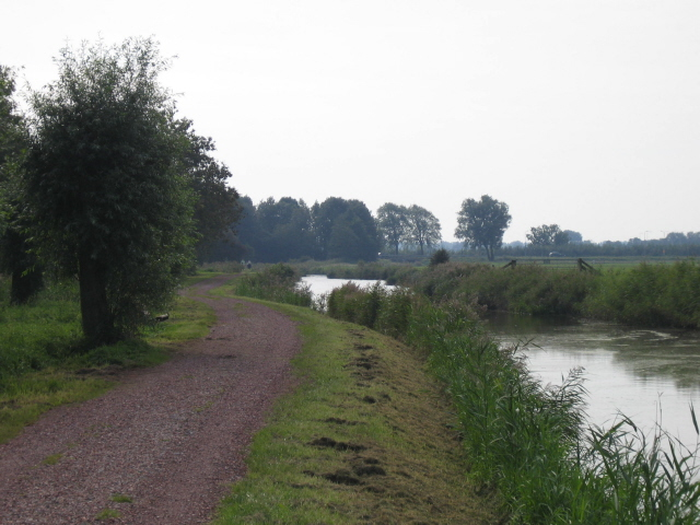 Uitwierdermaar, a river in between Delfzijl and Appingedam